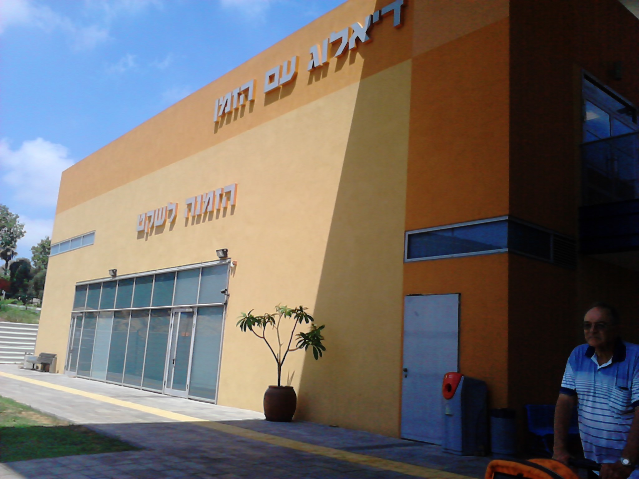 מבנה הזמנה לשקט במוזיאון הילדים חולון